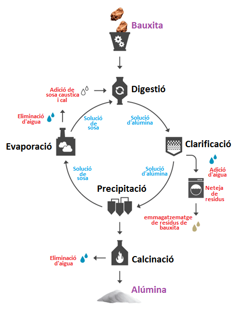 Gràfic sobre el procés de transformació de Bauxita a Alúmina.